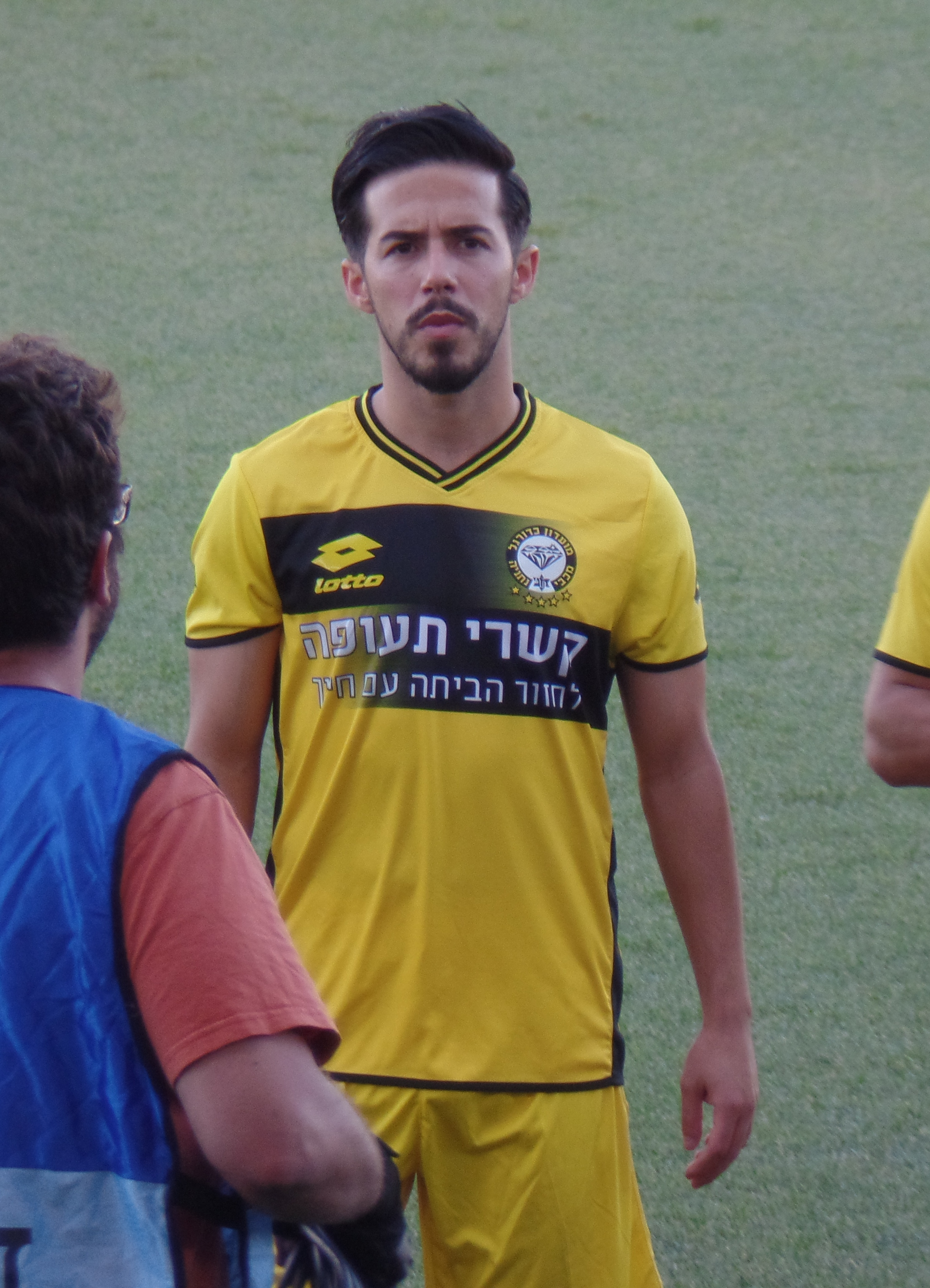 יאהמיר היקה במדי מכבי נתניה